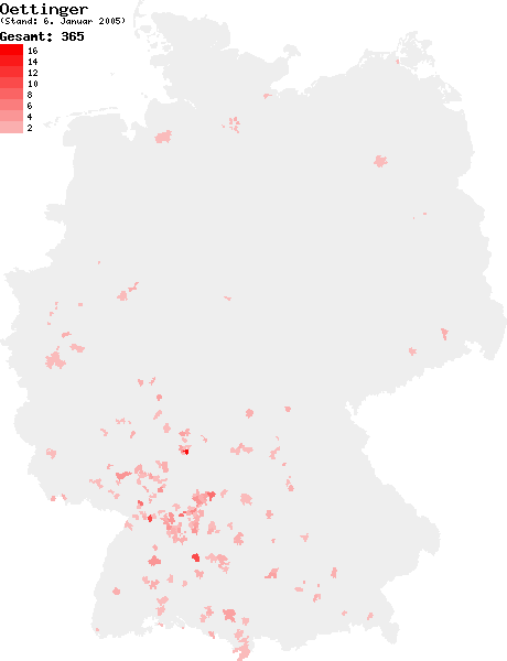 Verteilung des Nachnamens Oettinger in Deutschland nach dem Telefonbuch mit Stand vom 6. Januar 2005